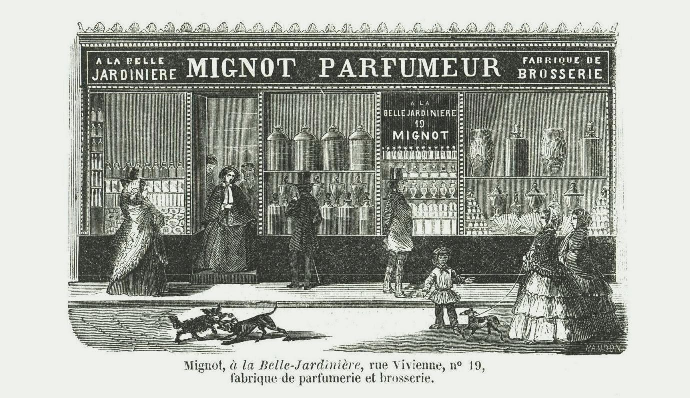 Parfumerie MIGNOT 19, rue Vivienne PARIS 2°